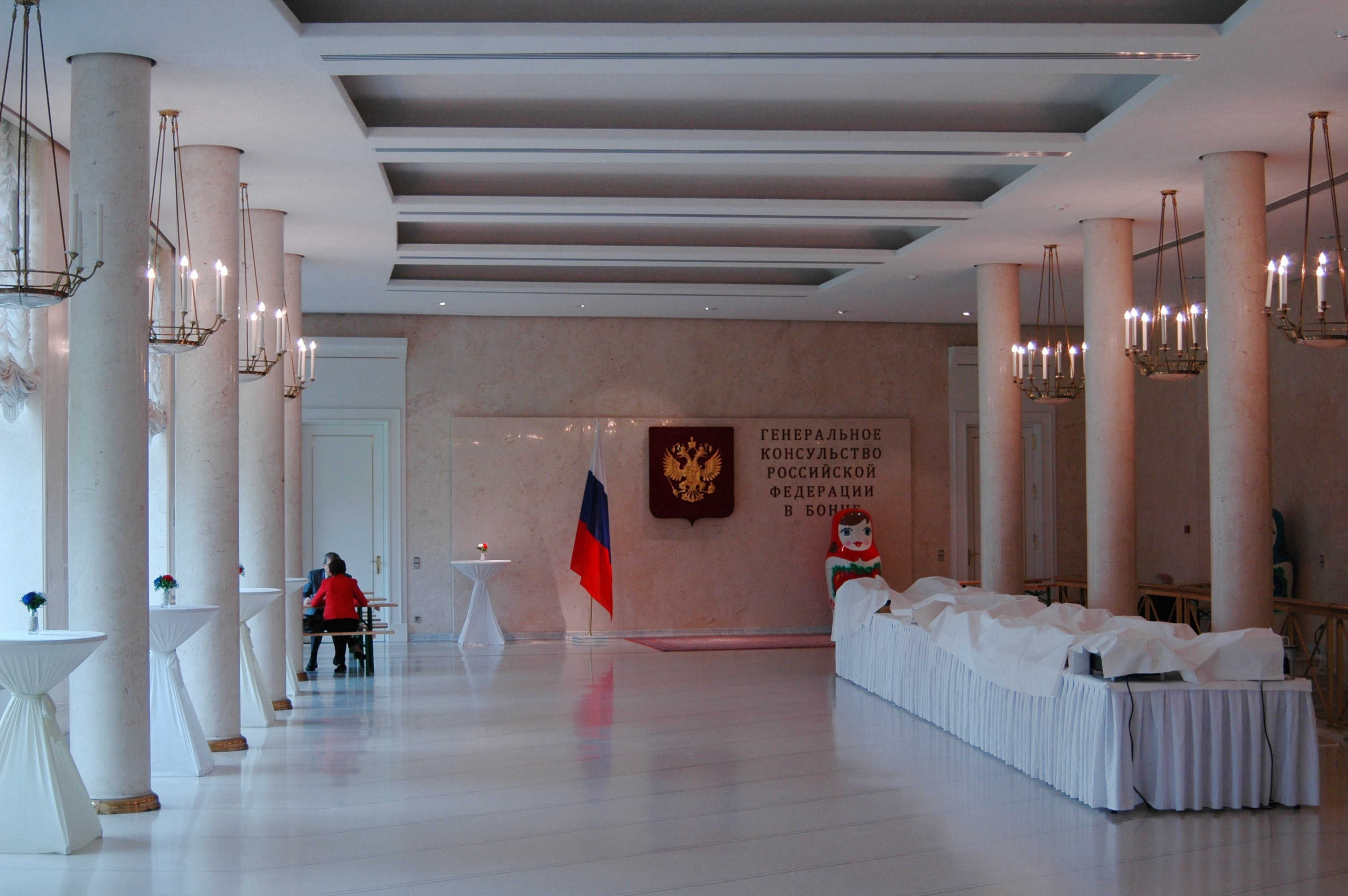 Bankettsaal im Generalkonsulat der Russischen Föderation in Bonn